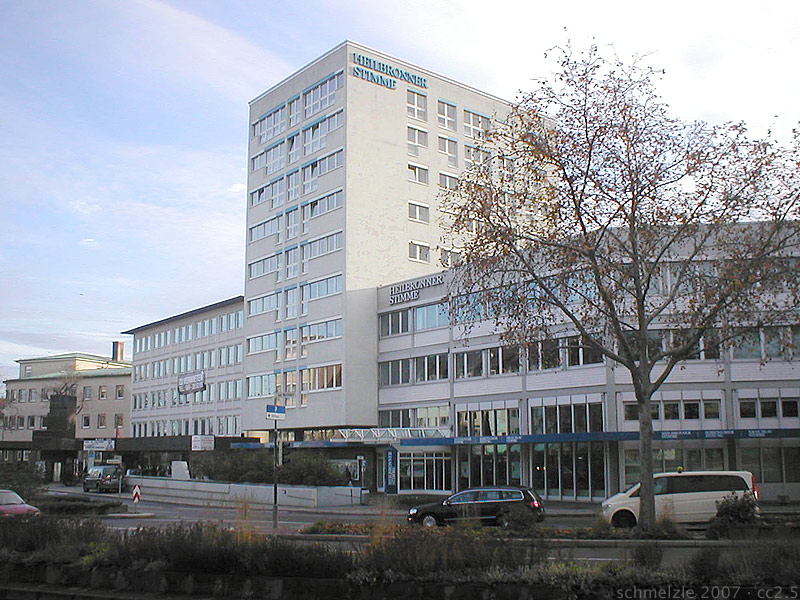 Hochhaus und langjähriger Sitz der Heilbronner Stimme an der Allee in Heilbronn